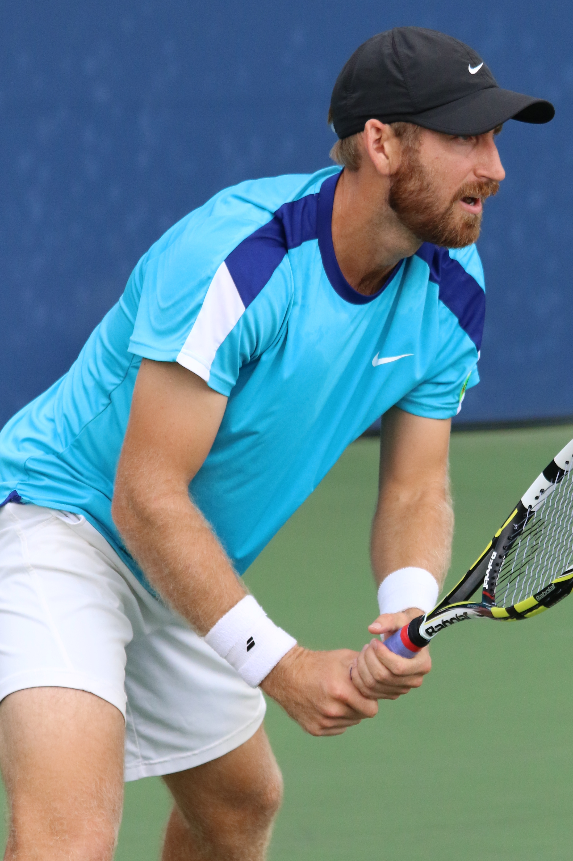 Meister US16 (38)